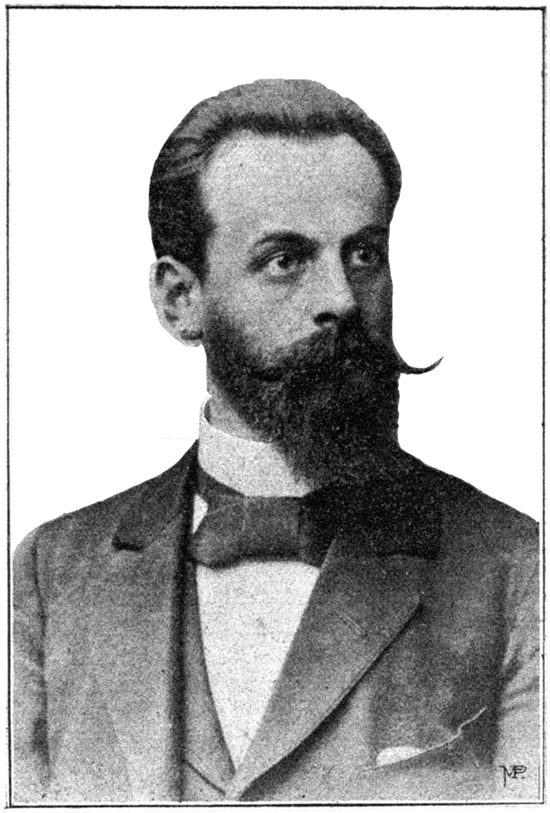 Dr. Heinrich Albrecht, Bakteriologe (1866–1922)